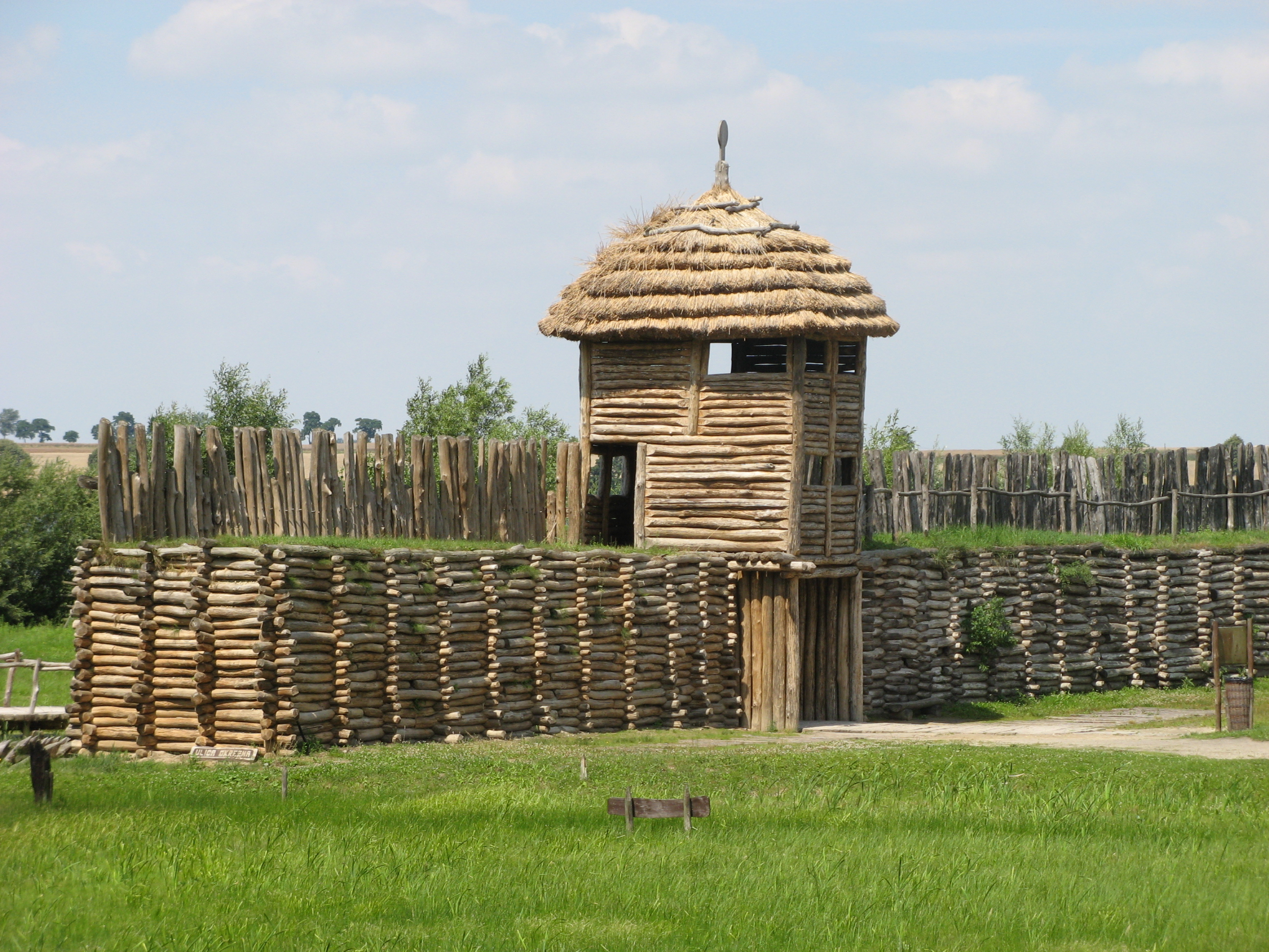 Biskupin - archeopark, rekonstrukce osady z doby bronzové. Brána od vnitřní strany.